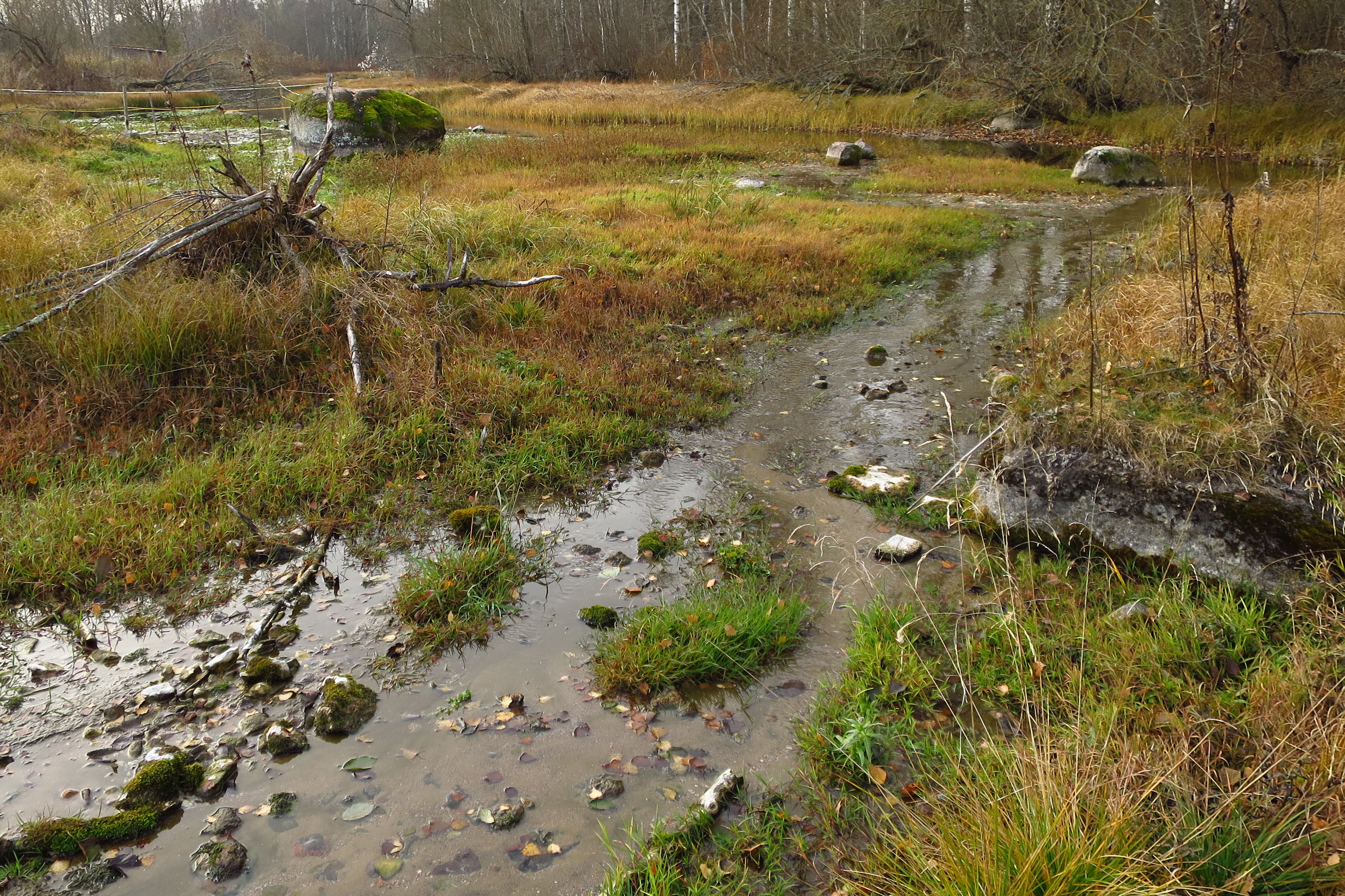 Jäneda allikad Allikajärvest ülesvoolu